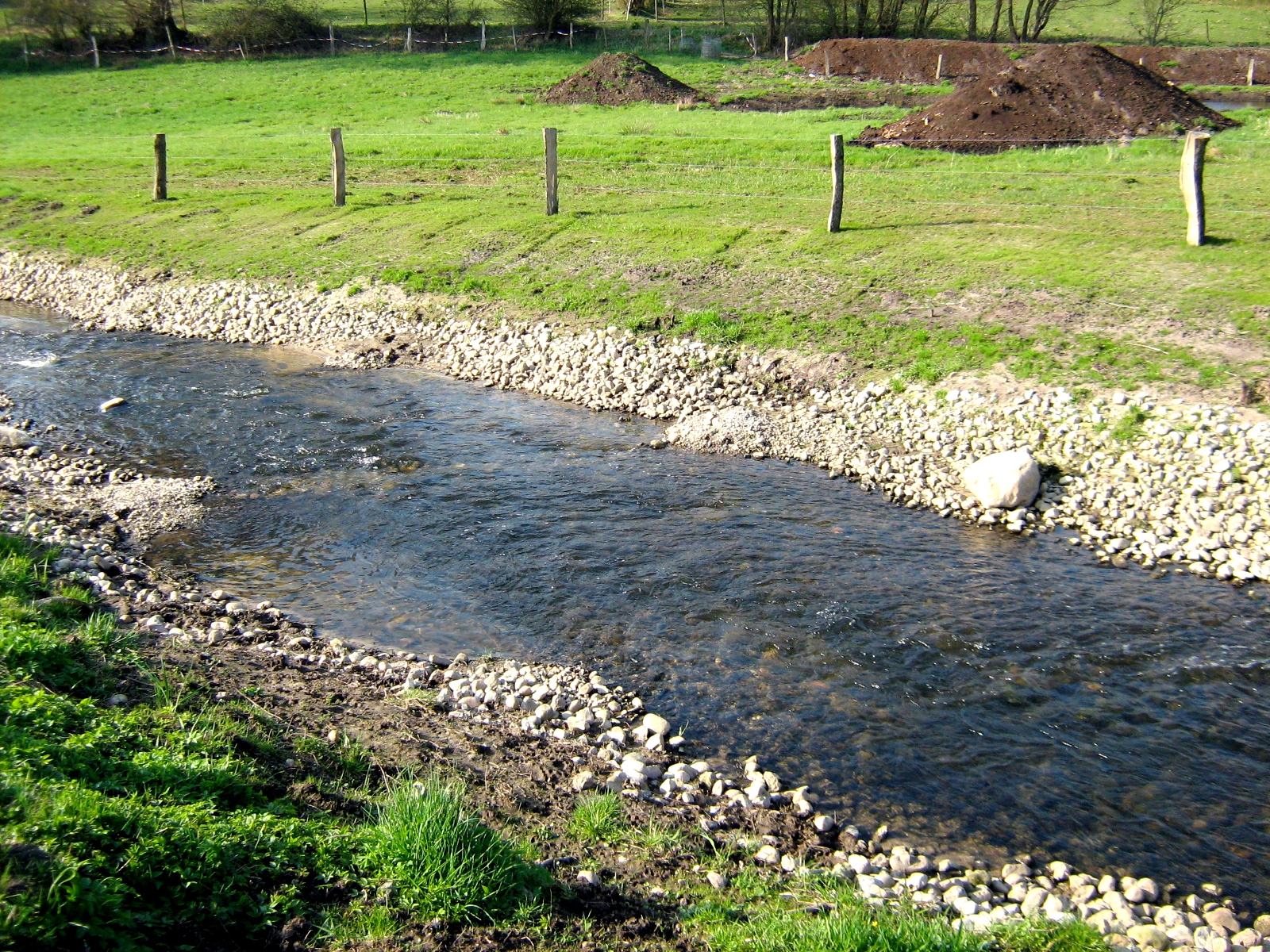 Naturnahe Gestaltung der Oxbek mit Förderung des Europäischen Landwirtschaftsfonds für die Entwicklung des ländlichen Raums; Randbereich des Naturschutzgebiets „Os bei Süderbrarup“